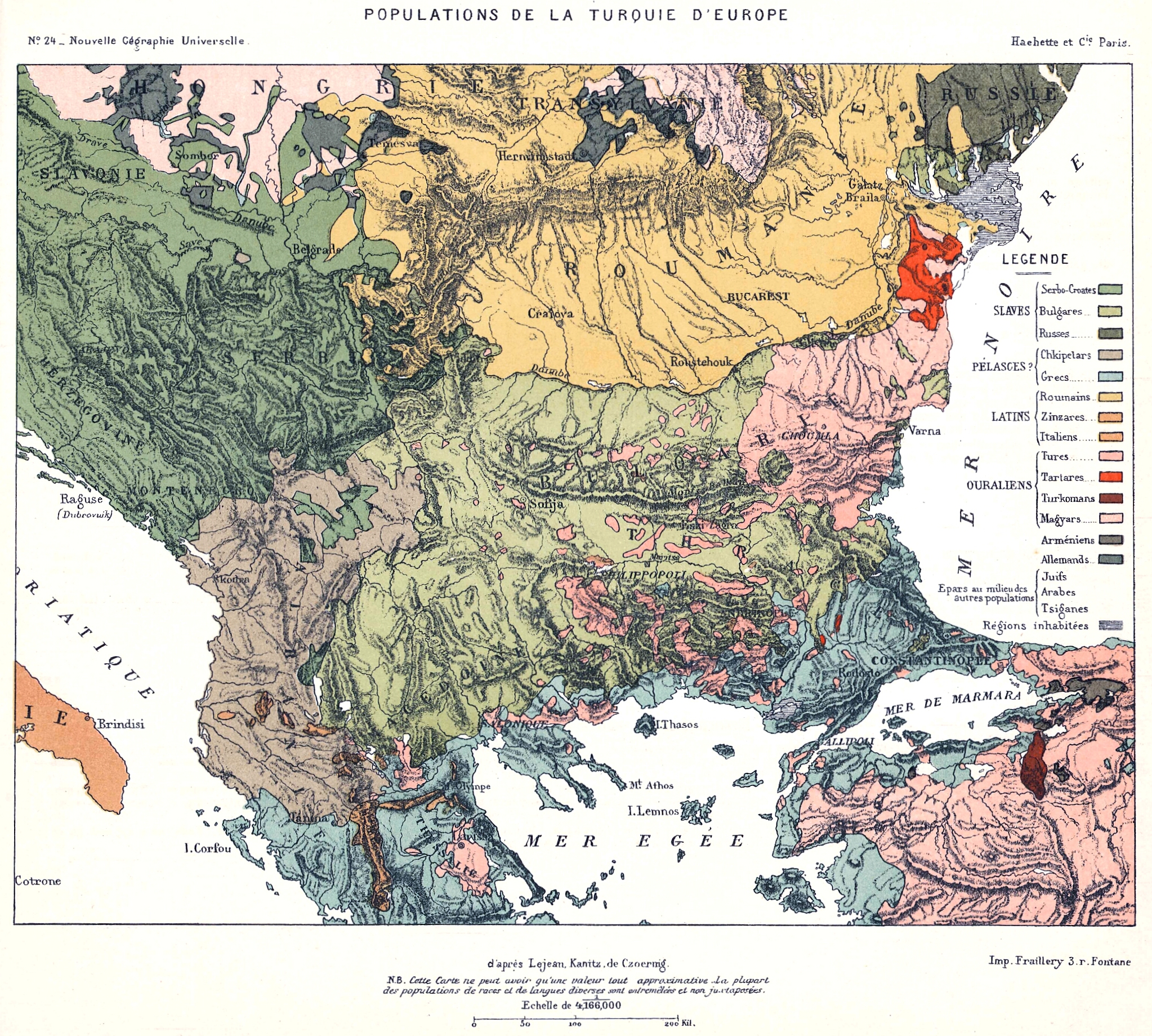 Populations de la Turquie d'Europe